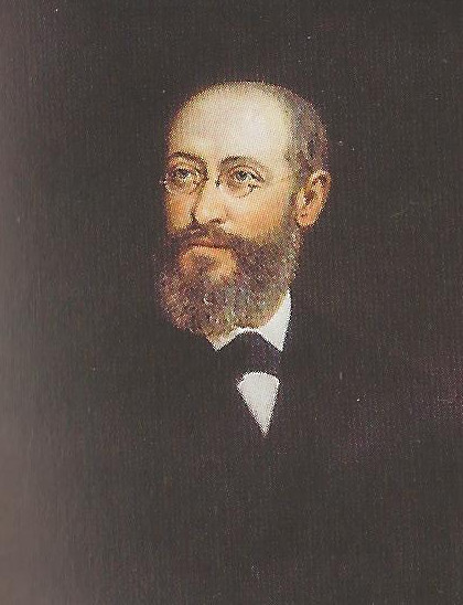 Porträt von Wilhelm Robert Tinter Edler von Marienwil (1839–1912), Rektor der Technischen Hochschule Wien